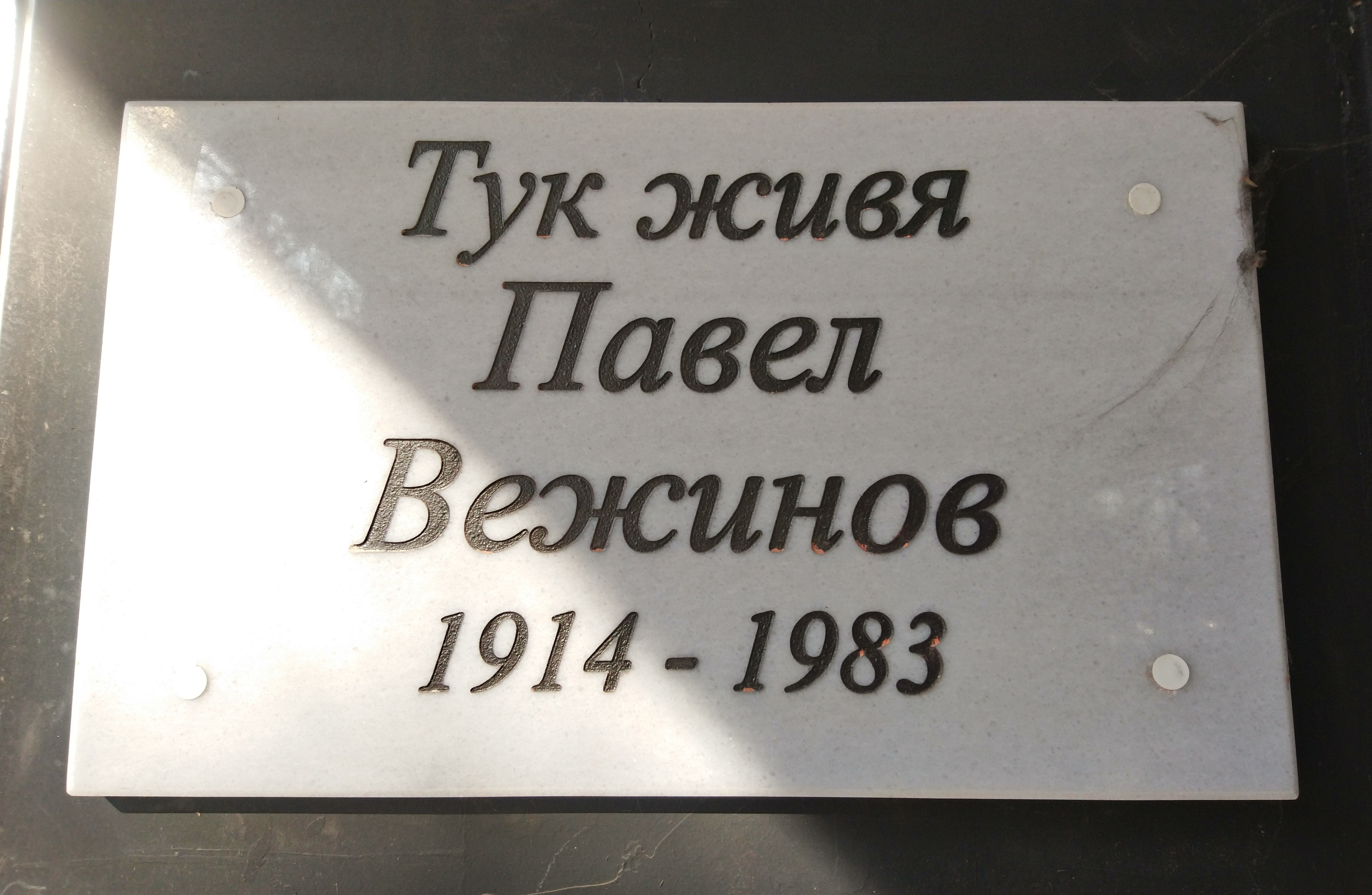 Паметната плоча на писателя Павел Вежинов, ул. Оборище № 3, София